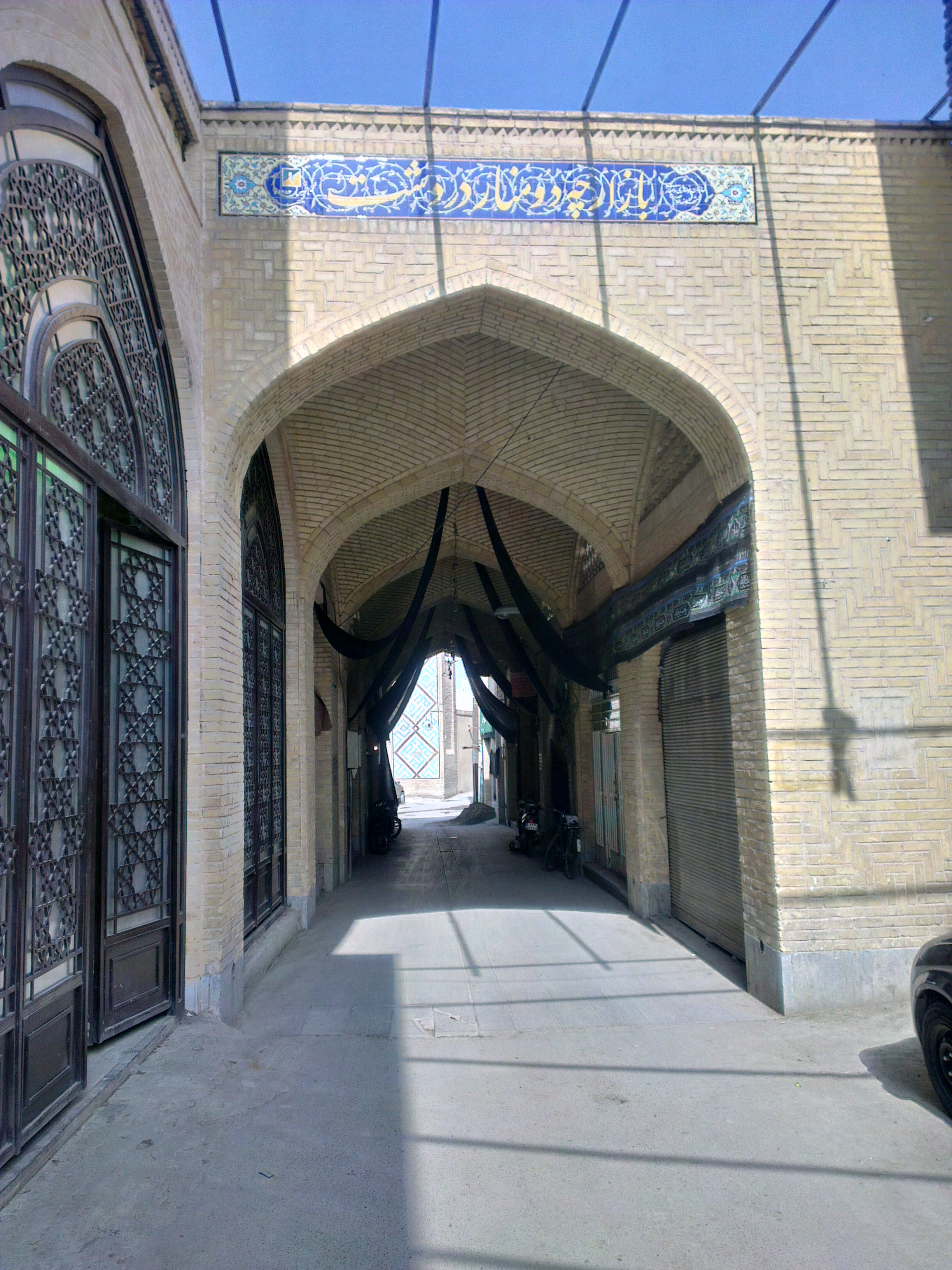 بازار دردشت Dardasht Bazar -Isfahan